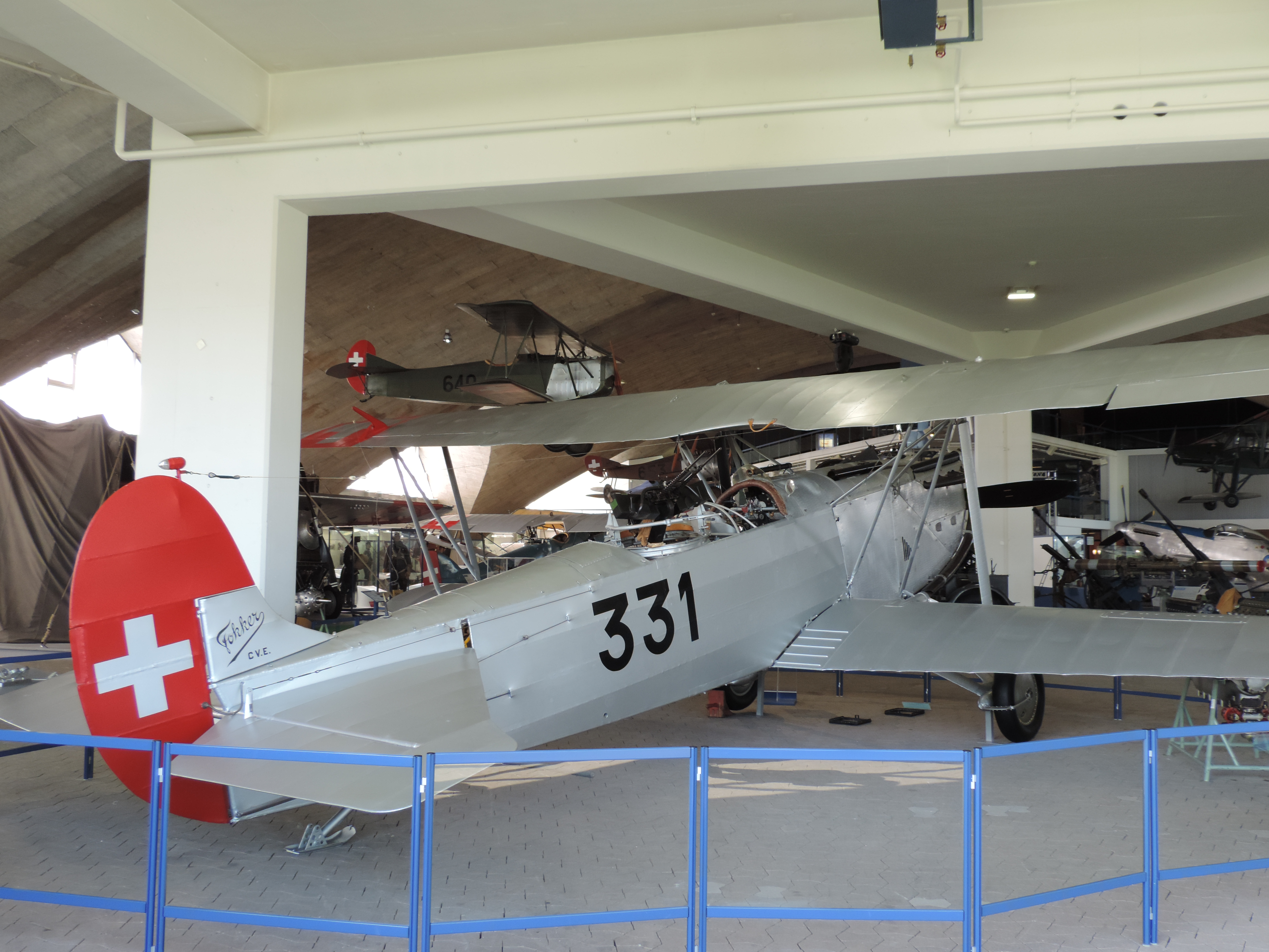 Fokker C.V-E im Flieger-Flab-Museum Dübendorf